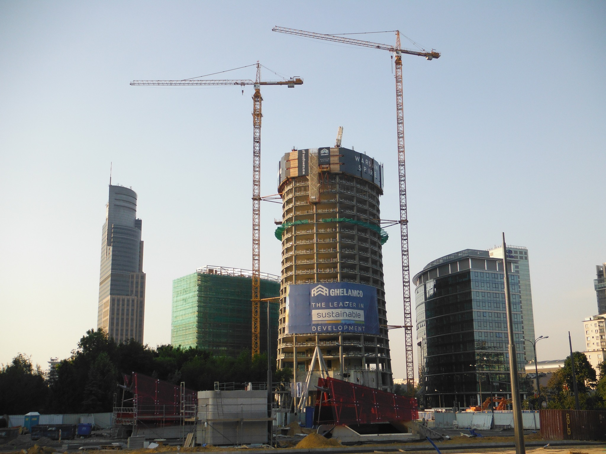 Budowa kompleksu Warsaw Spire.